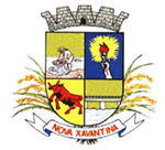 Brasão_Nova_Xavantina_MT.gif